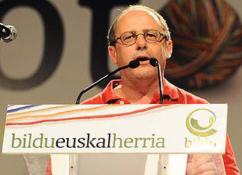 Juan Karlos Izagirre 2011n.